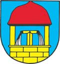 Wappen der Gemeinde Gutenbrunn in Österreich